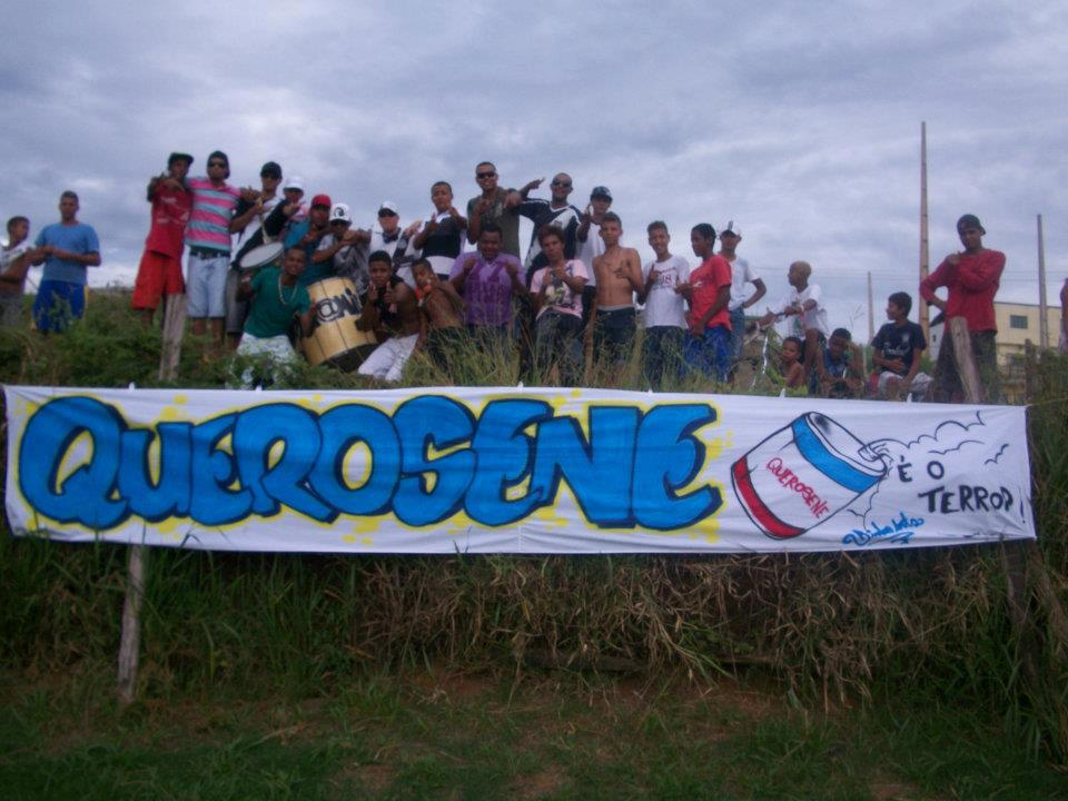 Torcida do Time Querosene FC